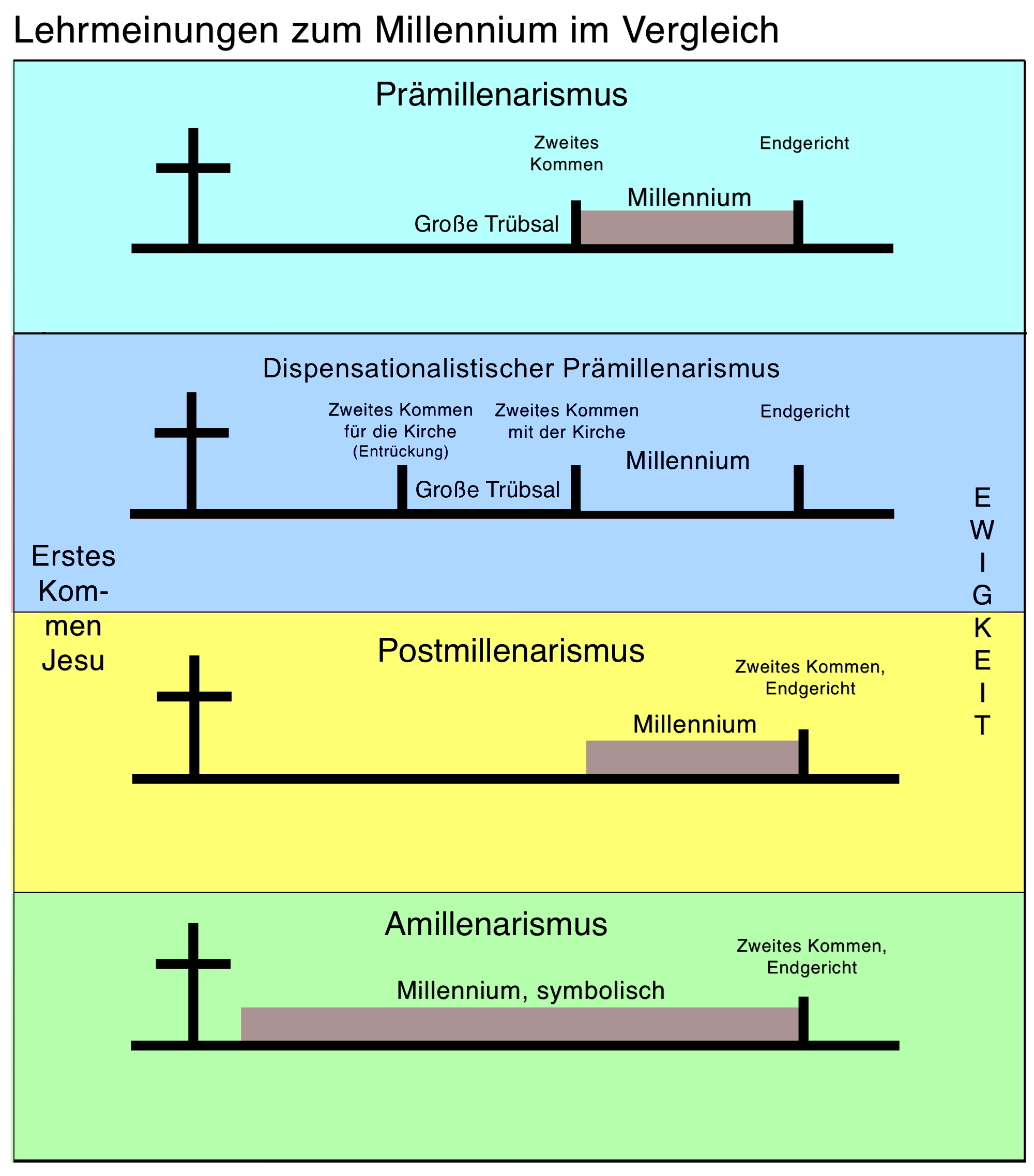 Sichtweisen 1000jähriges Reich